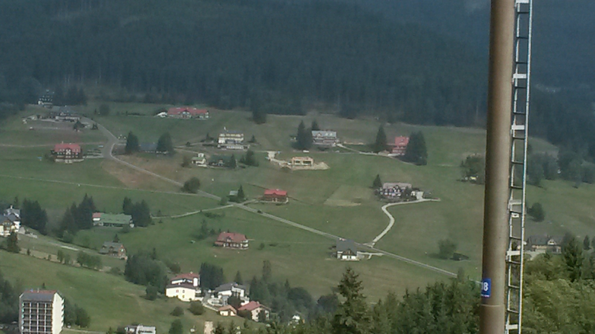 Pec pod Sněžkou